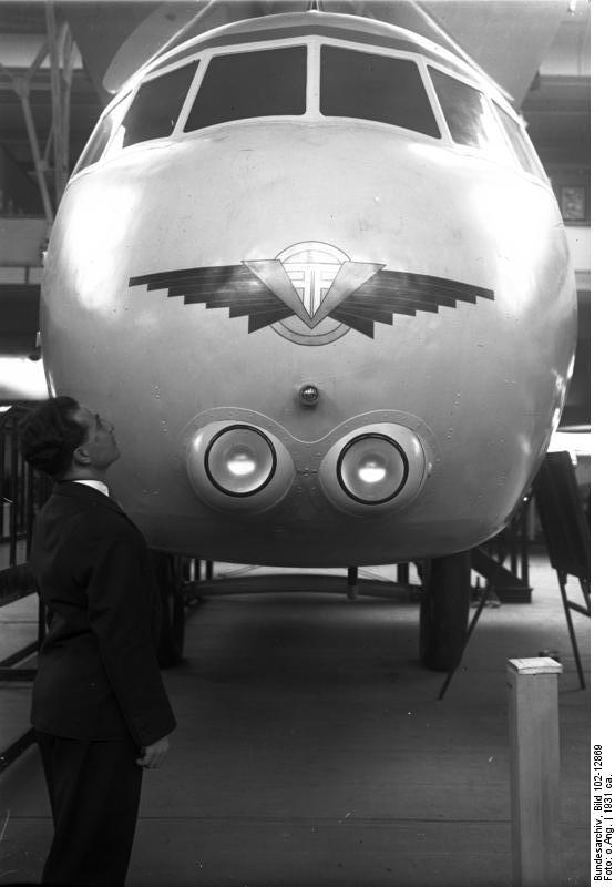 Das Gesicht des Flugzeuges! Der Bug des französischen Farman-Verkehrs-Gross-Flugzeuges, welches auf den grossen europäischen Ueberlandstrecken fliegt.